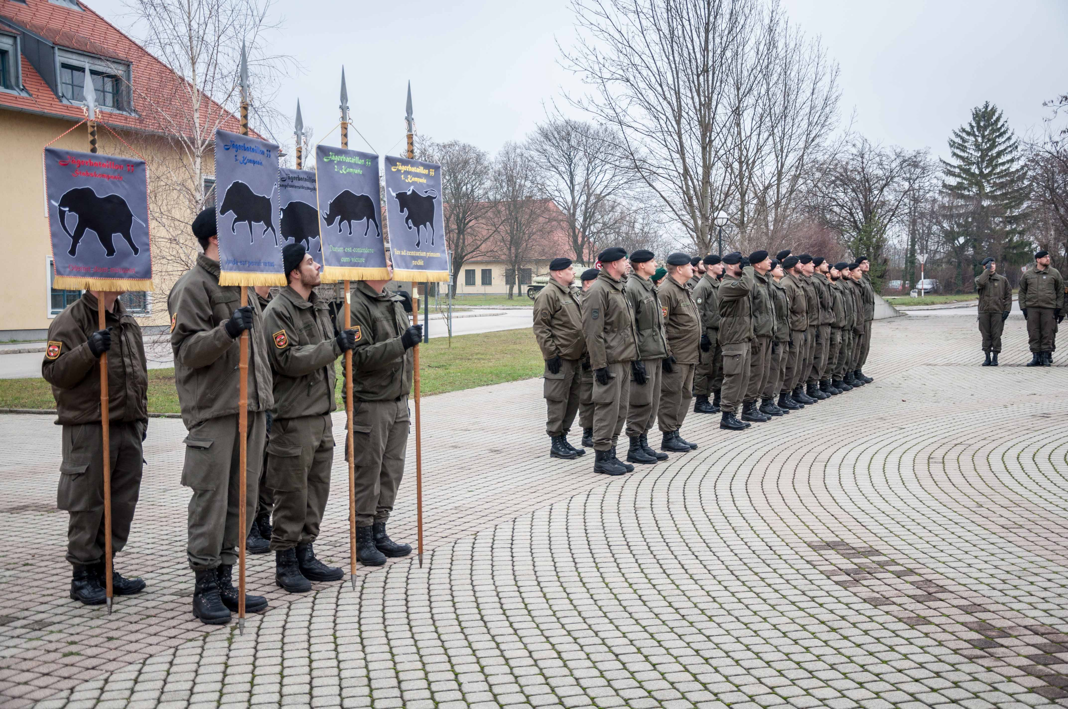 Päsentation der neuen Kompanieabzeichen 2018